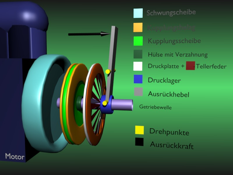 Kupplung explosiv 3D